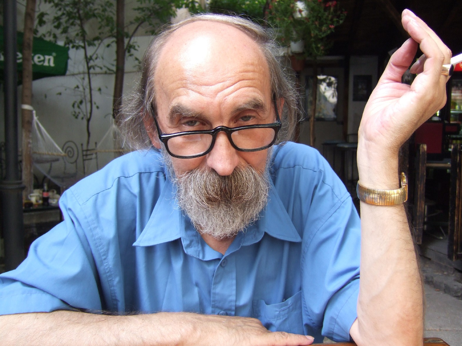 William Totok, București, 2007. Foto: Romulus Cristea